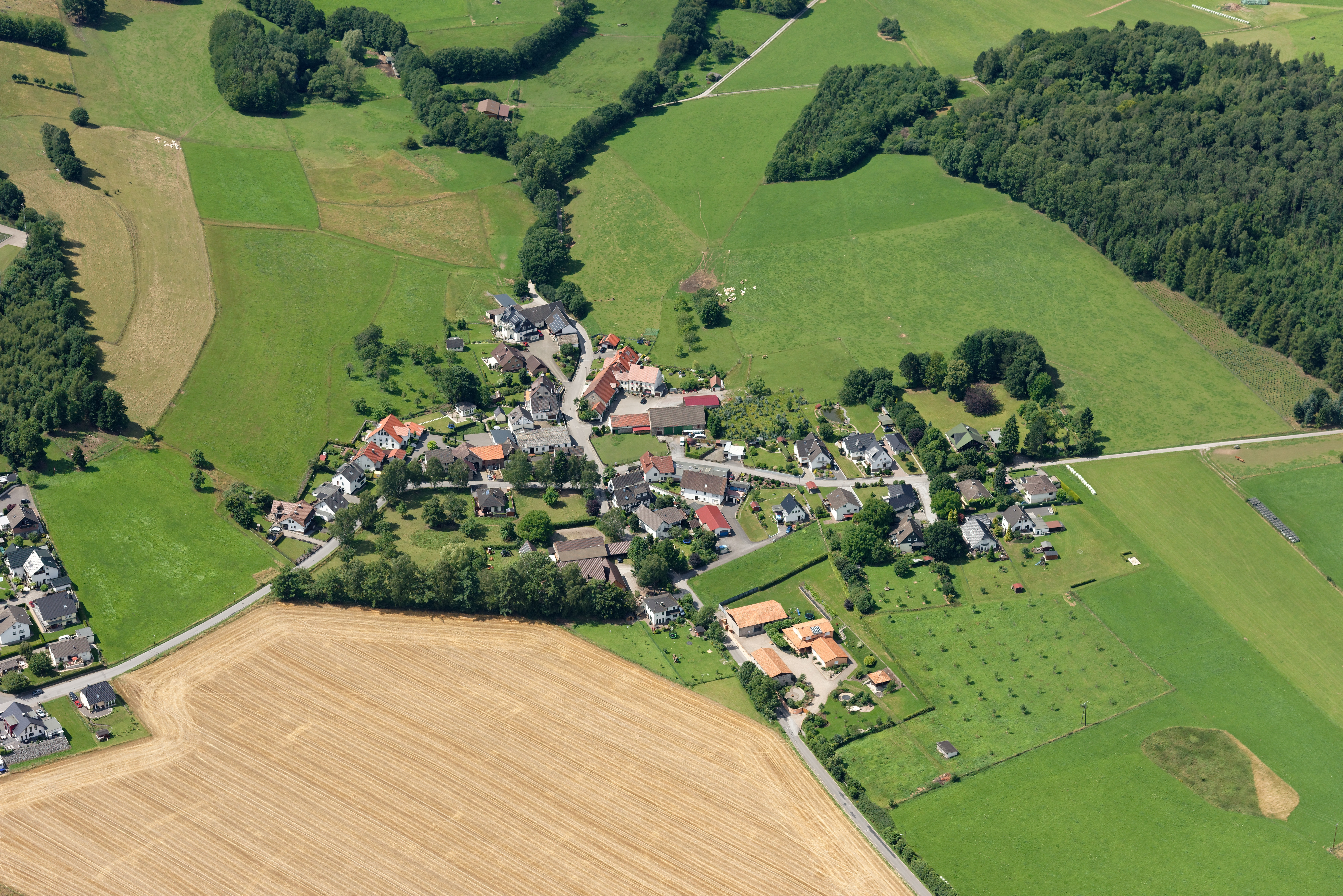 Luftaufnahme: Balve-Frühlinghausen, Nordrhein-Westfalen